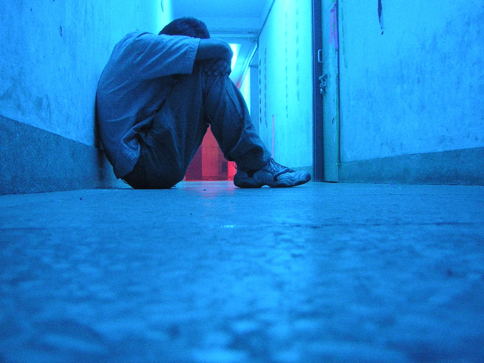 psychedelia